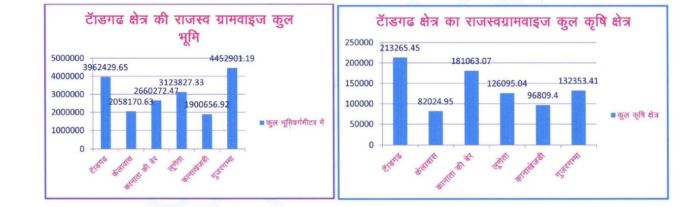 टॉडगढ